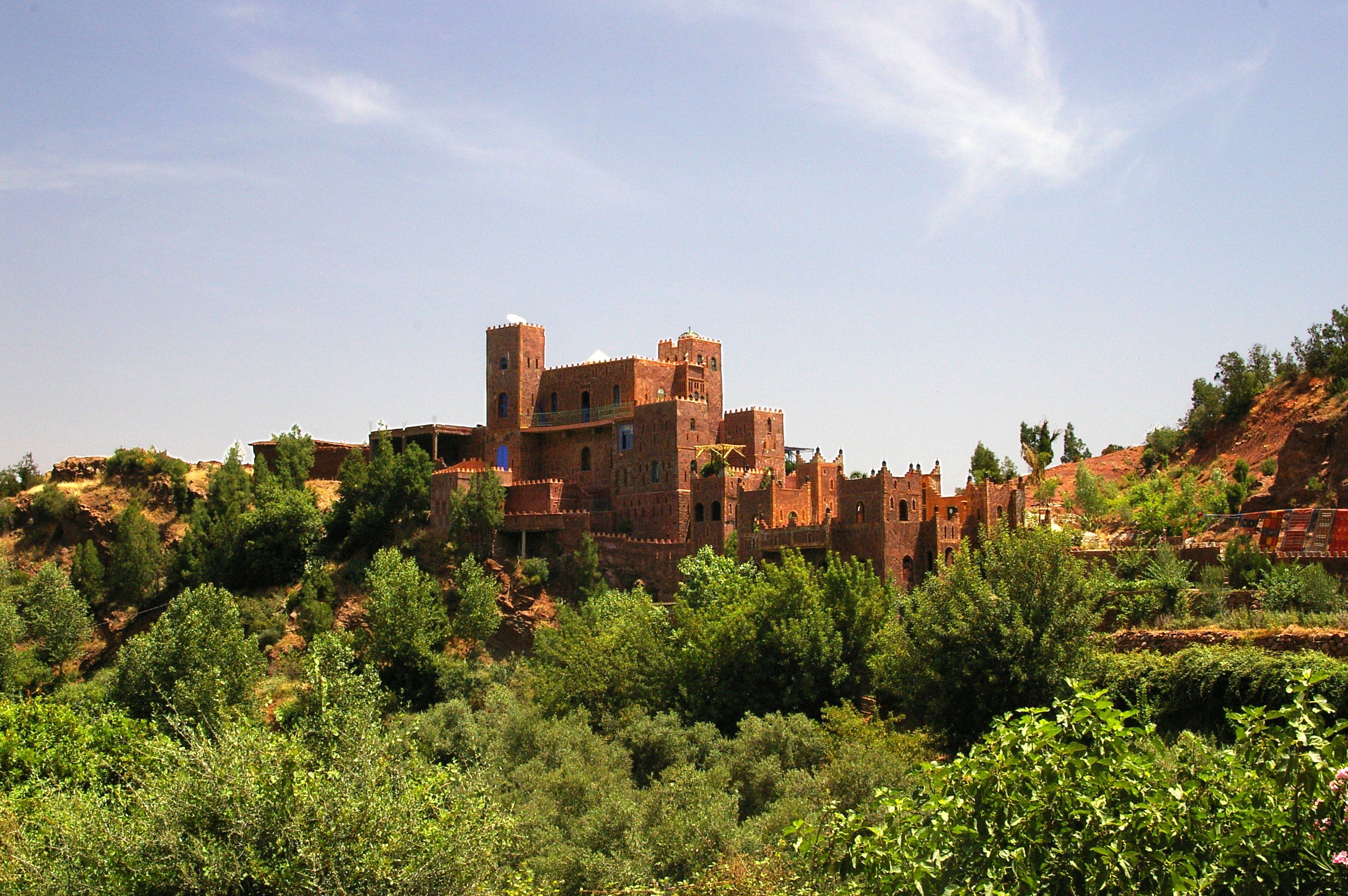 Kasbah in Ourika valley